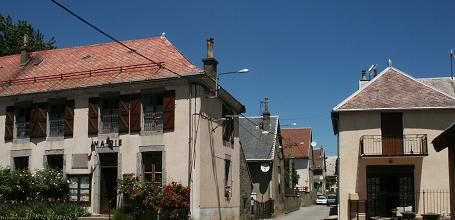 Place de la Mairie